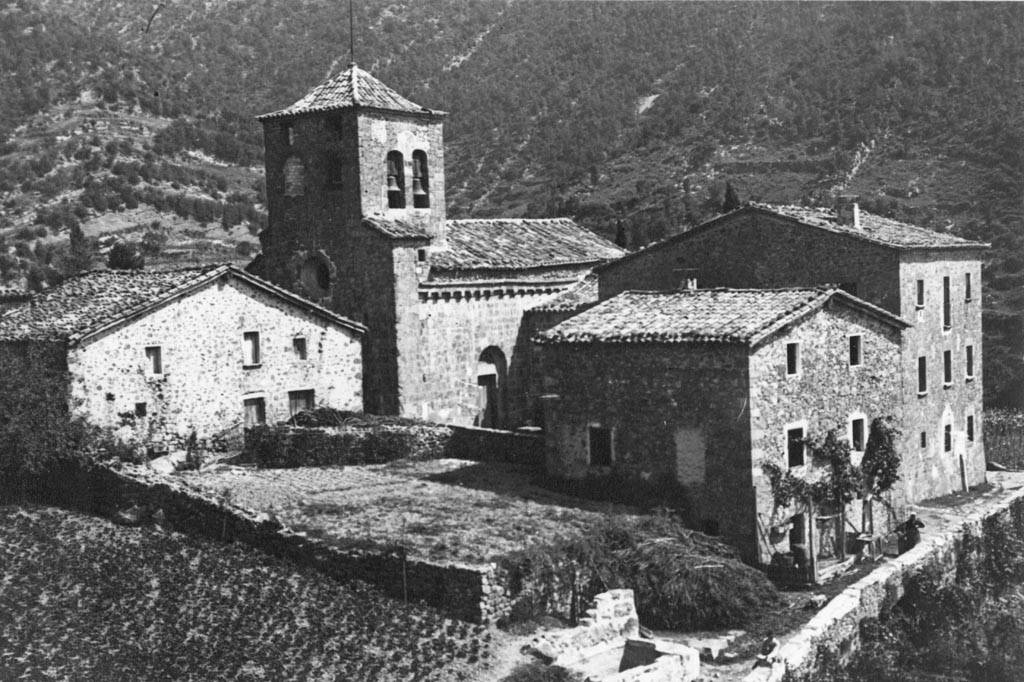 Església parroquial de Sant Salvador de Bianya. Cèsar August Torras i Ferreri (Entre 1890 i 1923)